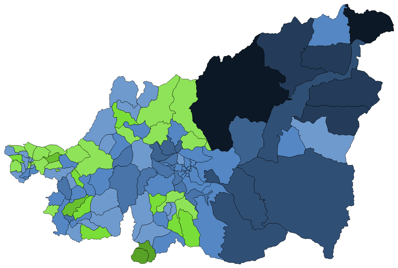 中文（台灣）: 顏色對照表